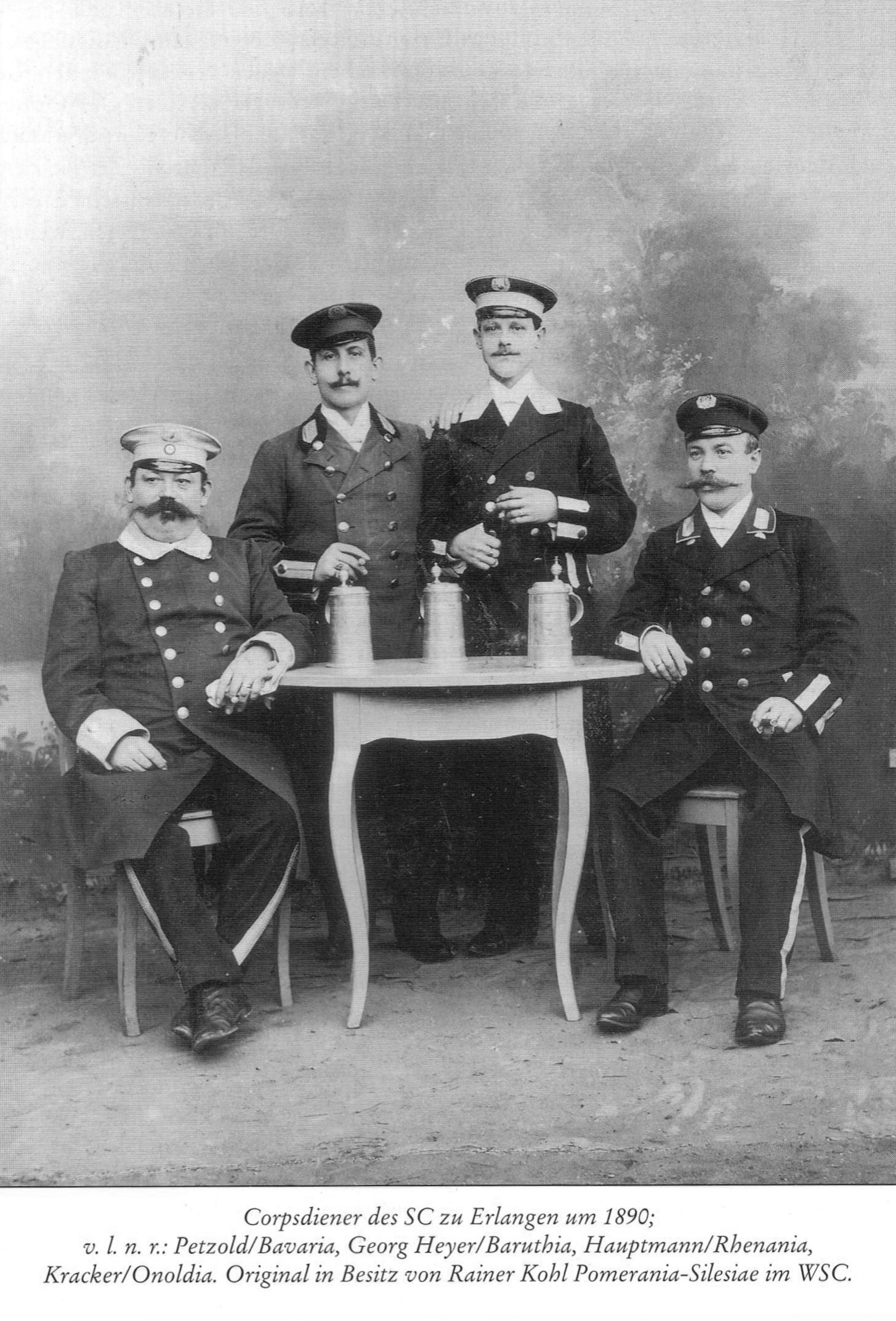 Uniformierte Diener der Erlanger Corps Bavaria, Baruthia, Rhenania und Onoldia